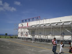 蘭嶼機場。